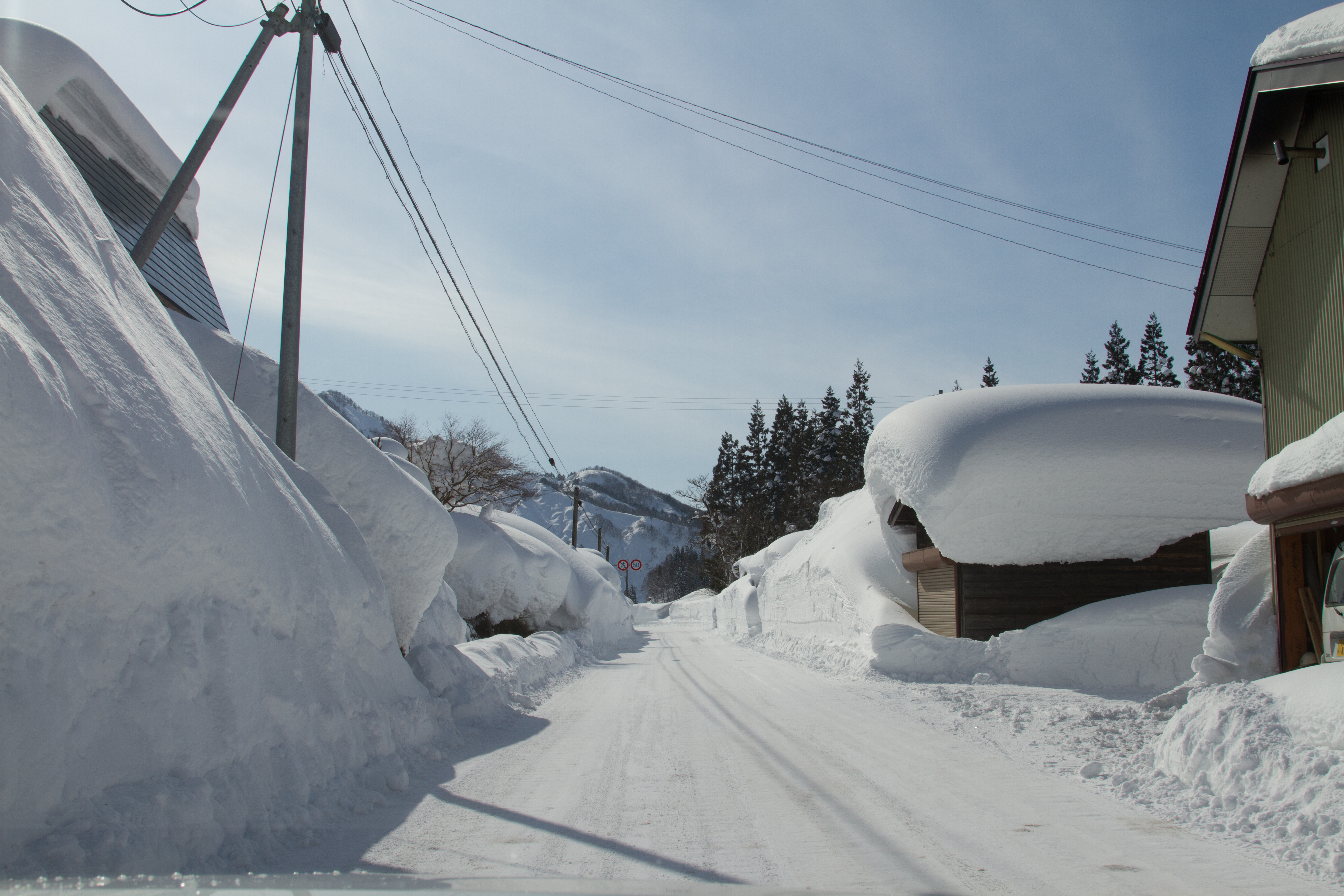 Yoriiwa, Tadami, Minamiaizu District, Fukushima Prefecture 968-0413, Japan